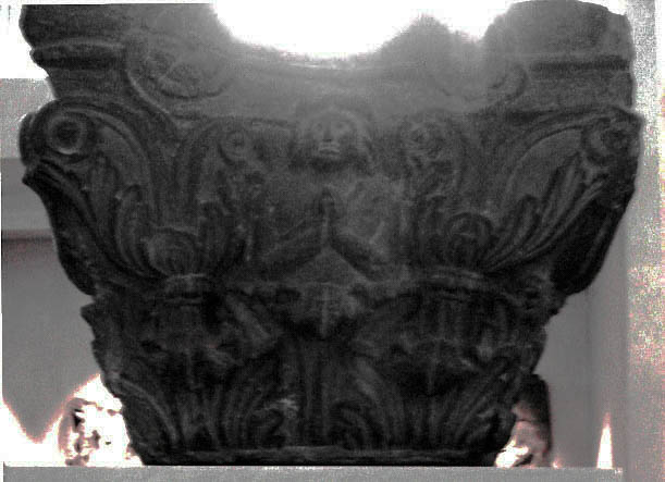 Butkara pilar, 20 BCE. Palazzo Madama, Torino. Personal photograph 2007.